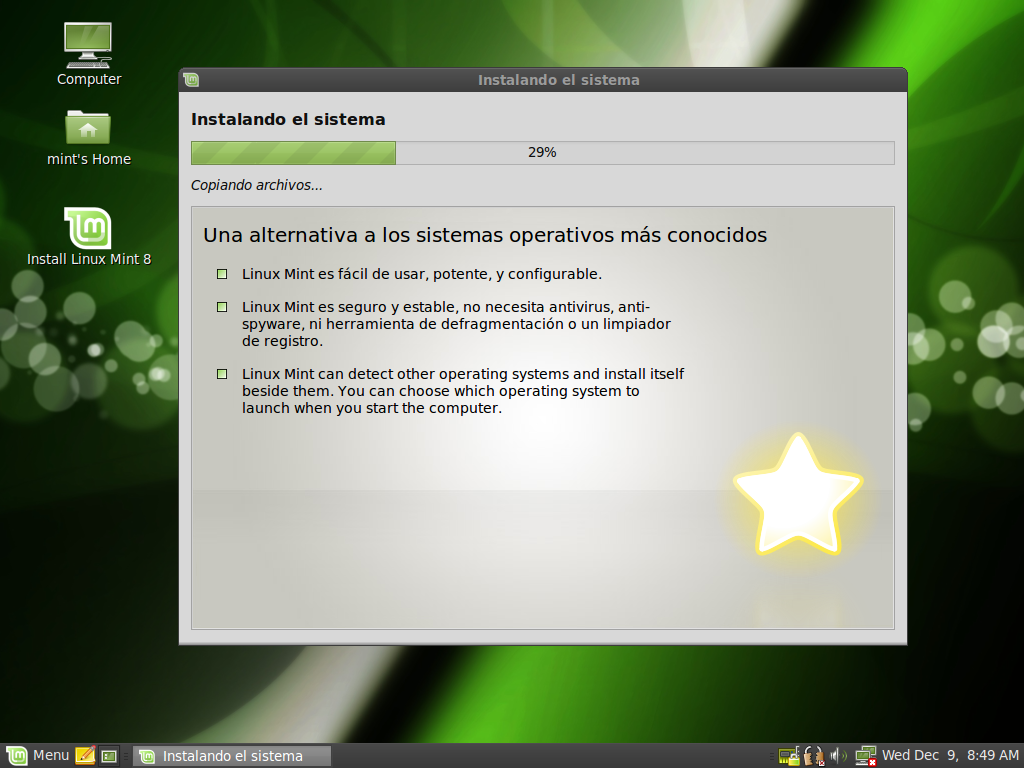 Instalación de Linux Mint